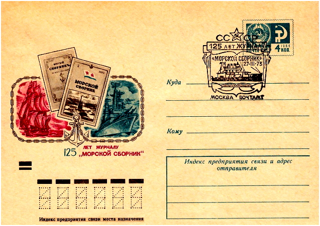 Конверт со специальным почтовым штемпелем СССР, посвящённым 125-летию журнала «Морской сборник»